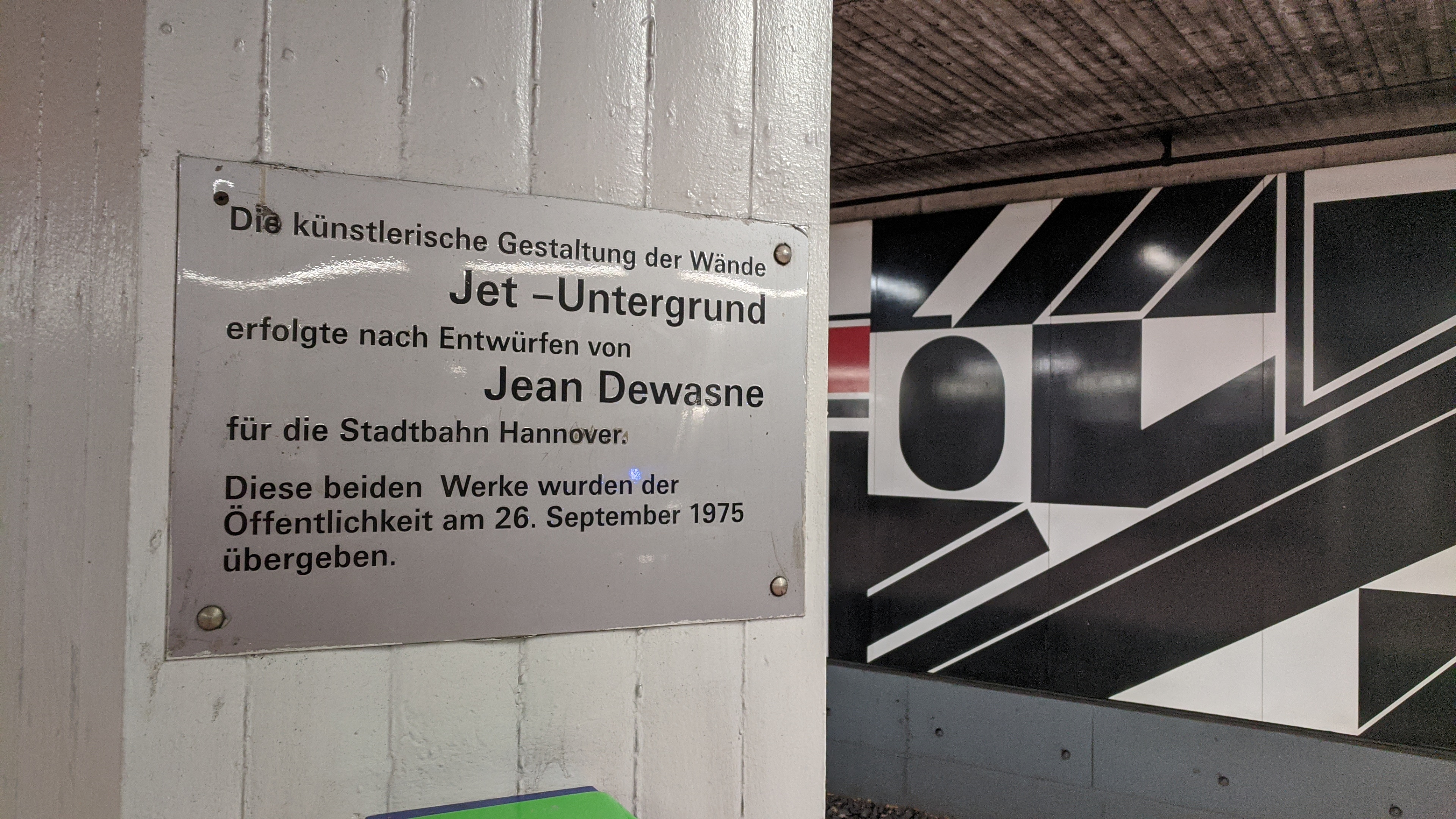 Stadtbahn Hannover, U-Bahnhof Hannover Hauptbahnhof, Die Gestaltung der Außenwände im Stil des abstrakten Konstruktivismus erfolgte nach Entwürfen des französischen Künstlers Jean Dewasne. Taken on 24 January 2020